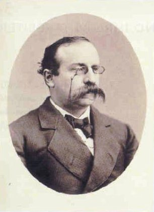 Theodor von Holleben (* 16. September 1838 in Stettin; † 31. Januar 1913 in Berlin) war ein kaiserlich-deutscher Diplomat und Politiker.